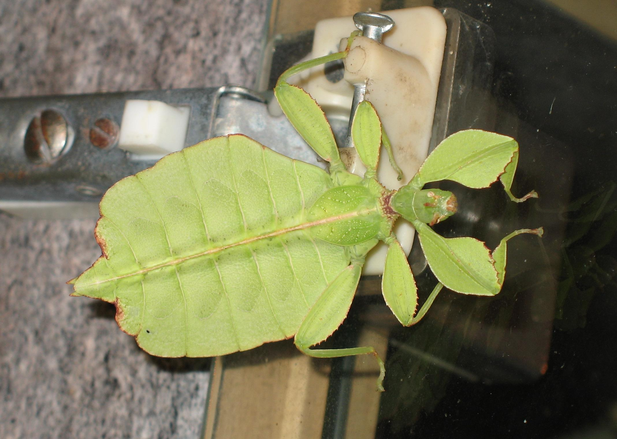 Phyllium philippinicum - female larva L4